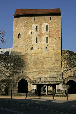 Avenches: Amphitheater